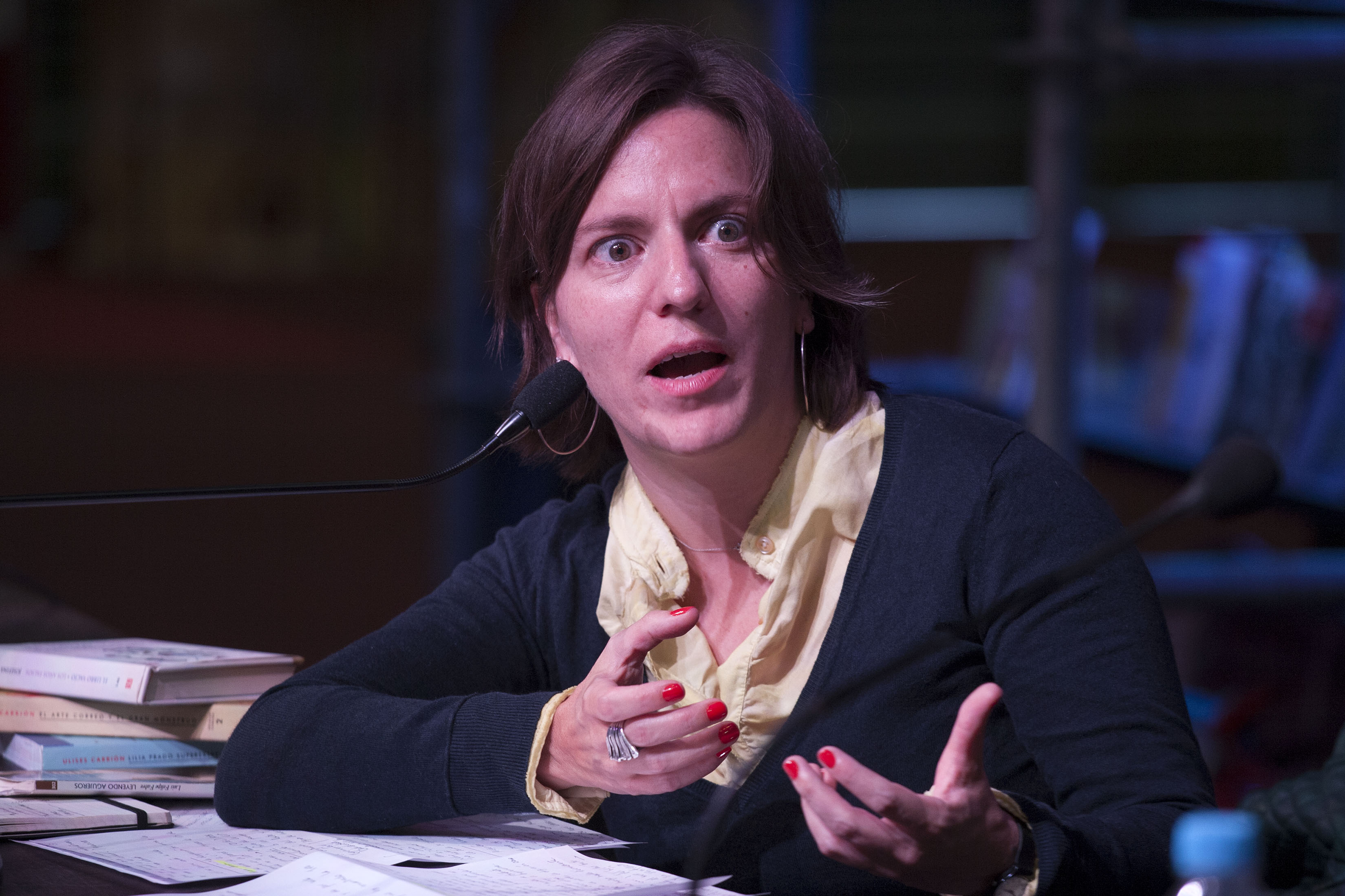 Domingo, 10 de Mayo 2015. En el marco de la 41a Feria Internacional del Libro de Buenos Aires se realizó la charla Josefina Vicens y Ulises Carrión: El Mundo como algo Ajeno con la participación de Vivián Abenshushan y Daniela Tarazona en el Stand de la Ciudad de México. Foto: Antonio Nava / Secretaría de Cultura Ciudad de México.